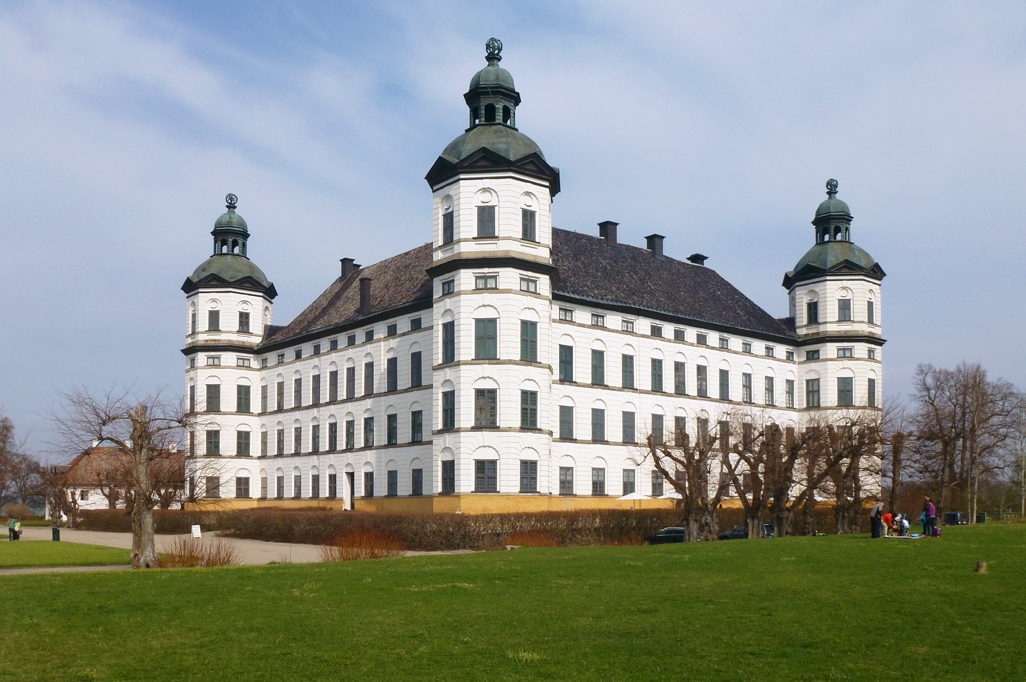 Skokloster fasad mot väst